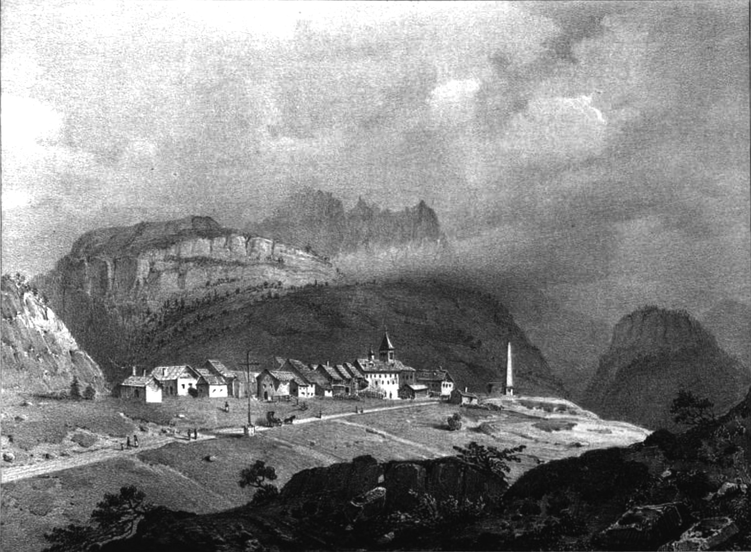 Album du Dauphiné - tome III, litographie du Mont-Genevre